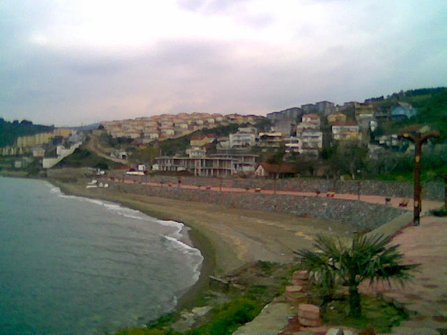 Altınkum, Güzelyalı